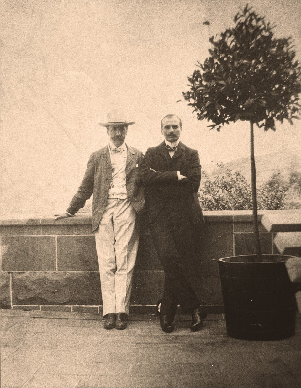 Heinrich Metzendorf (links) und sein Bruder Georg.